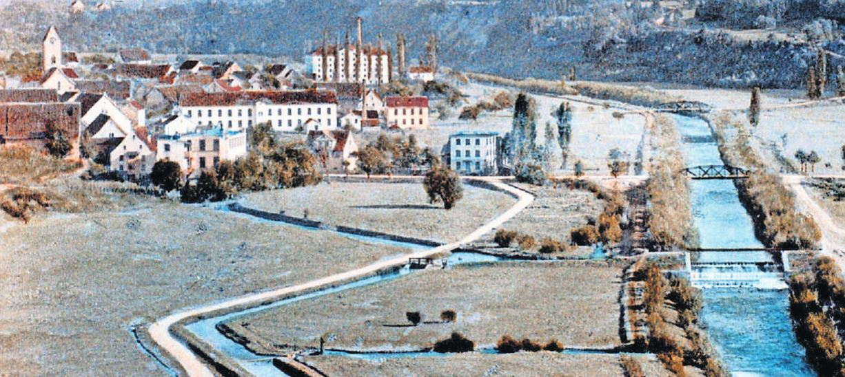 Kraftwerk, Weberei, Spinnerei, Glattfelden ZH, Schweiz, 1900